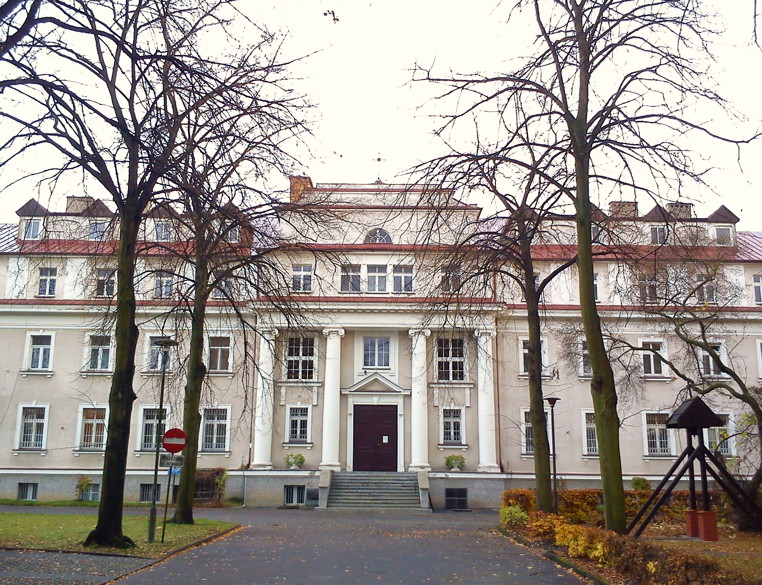 Poznań - Pokrzywno. Dom Urszulanek. Dawny nazistowski Centralny Instytut Badań nad Rakiem.